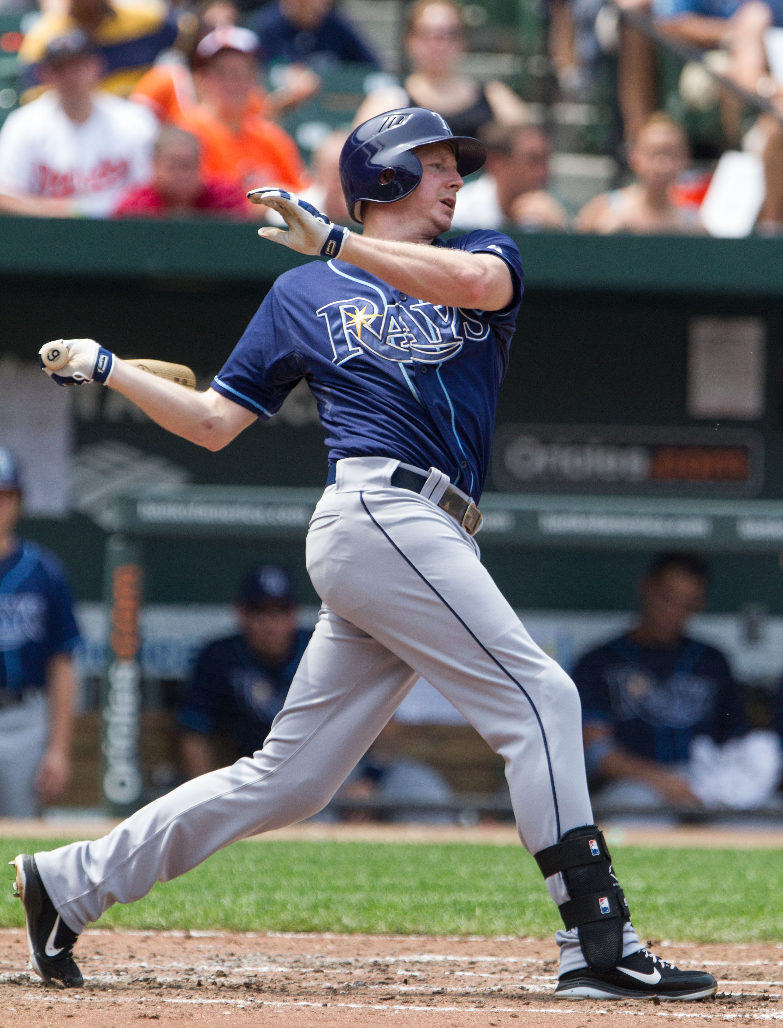 Elliot Johnson